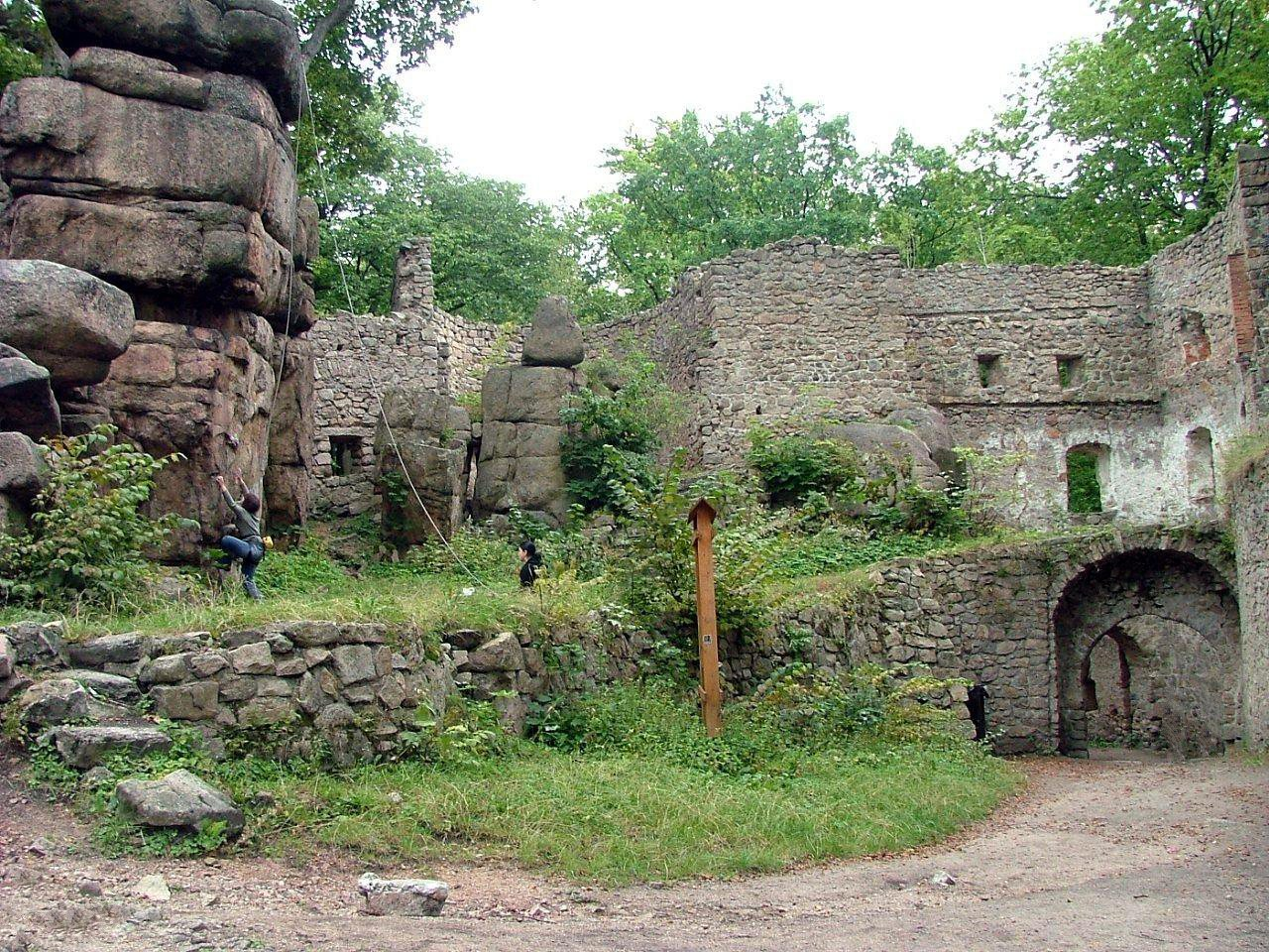 Ruiny zamku Bolczów